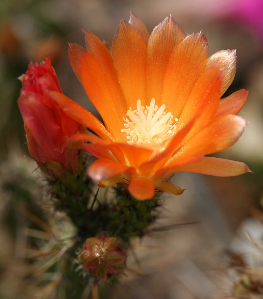 Corryocactus maximus